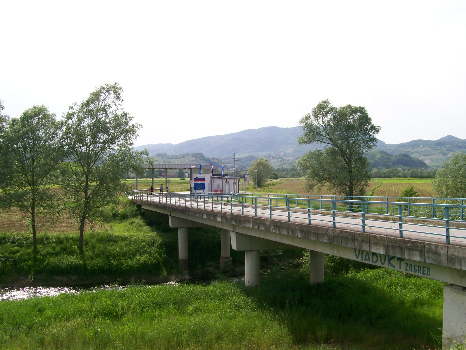 Granični most između RH i SLO preko rijeke Sutle u mjestu Draše